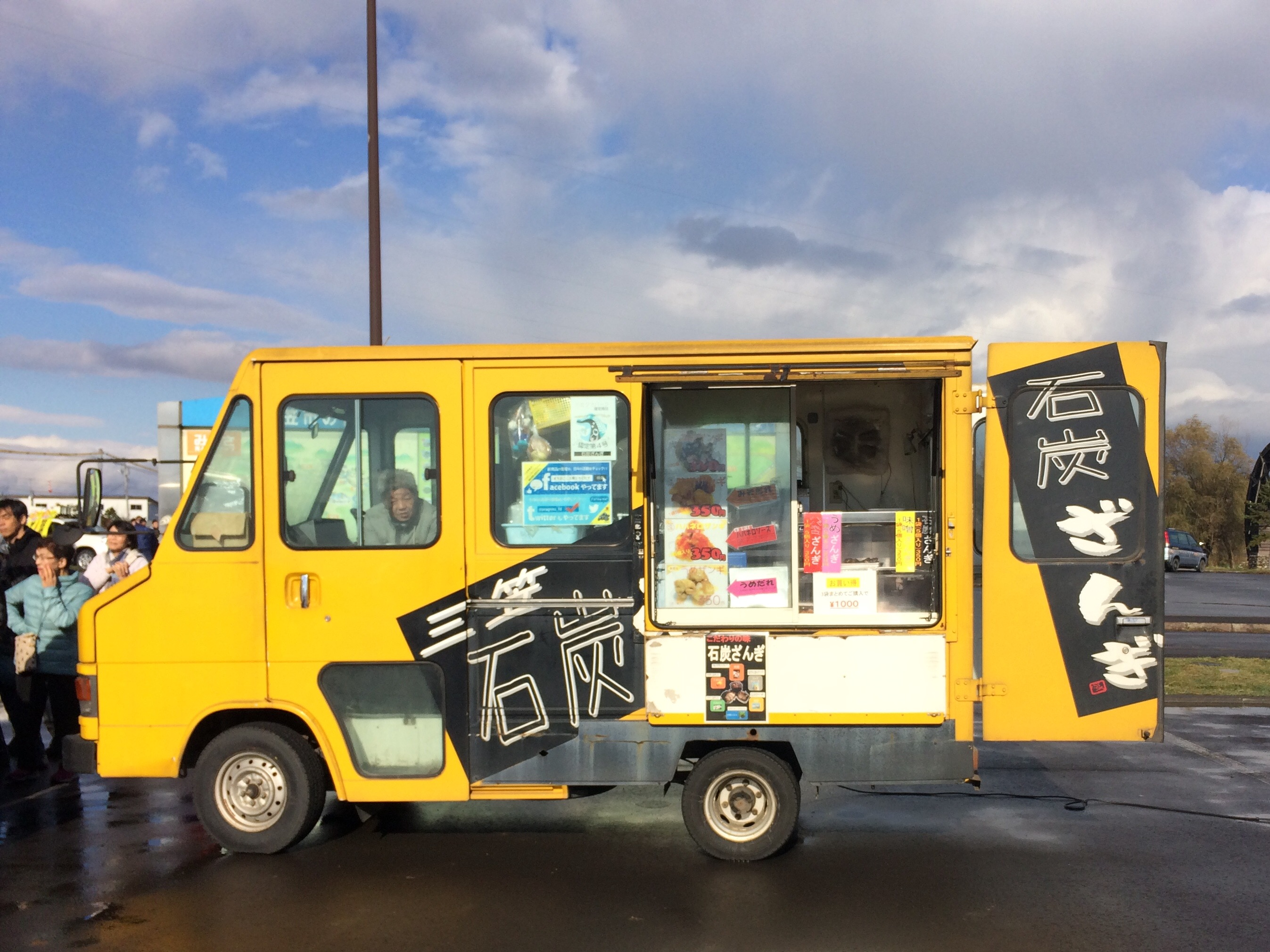 北海道三笠、道の駅「みかさ」で石炭ザンギを移動販売する車。